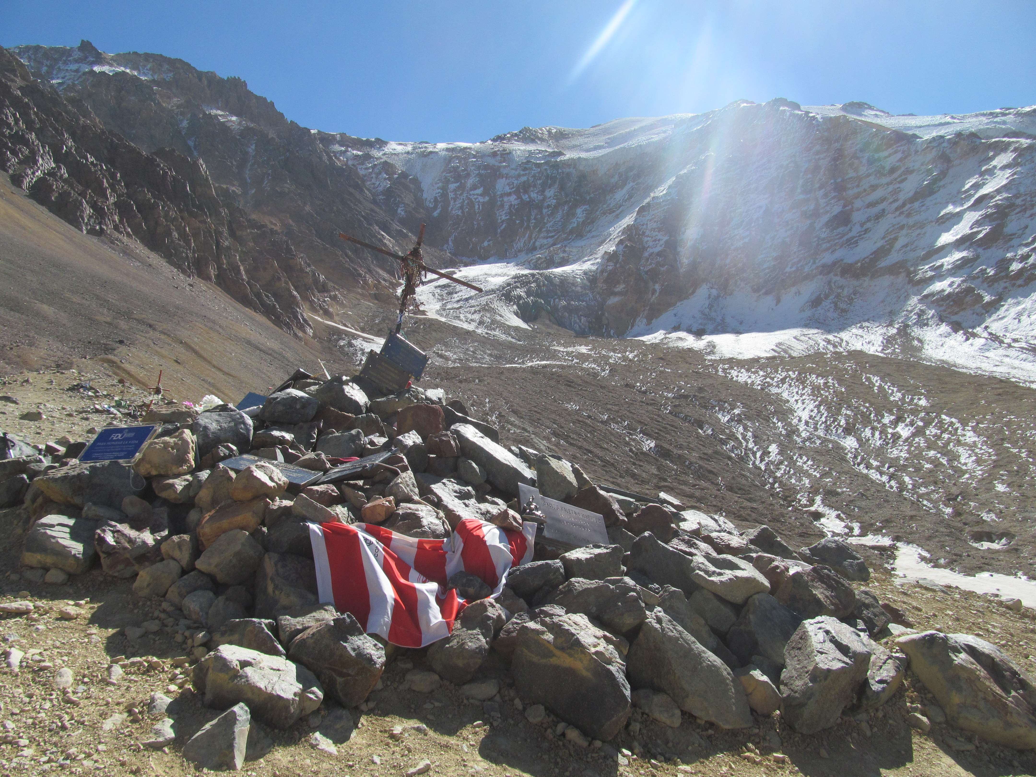 Lugar del homenaje del vuelo 571 de la Fuerza Aérea Uruguaya.